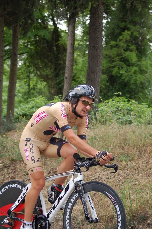 Marco Corti, Giro d'Italia 2010